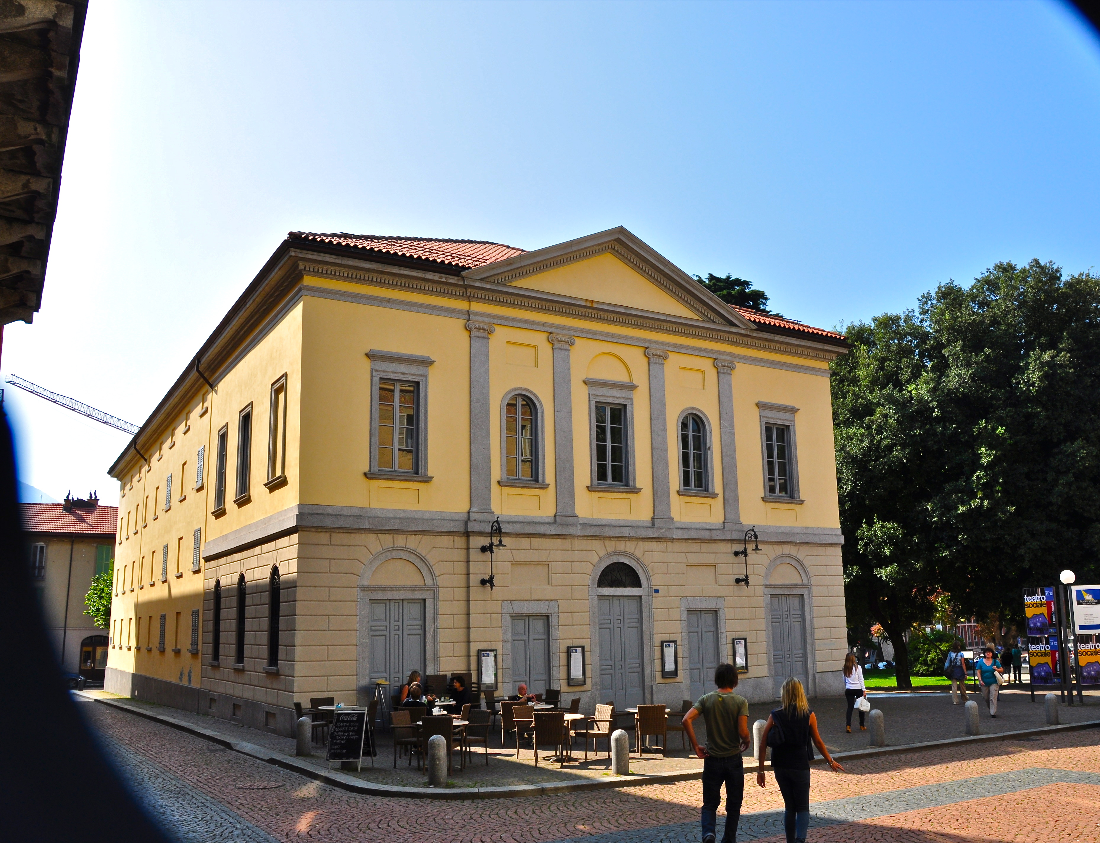 Facciata Frontale. Edificato tra il 1846 e il 1847, dall'ingegner Rocco Von Mentlen.